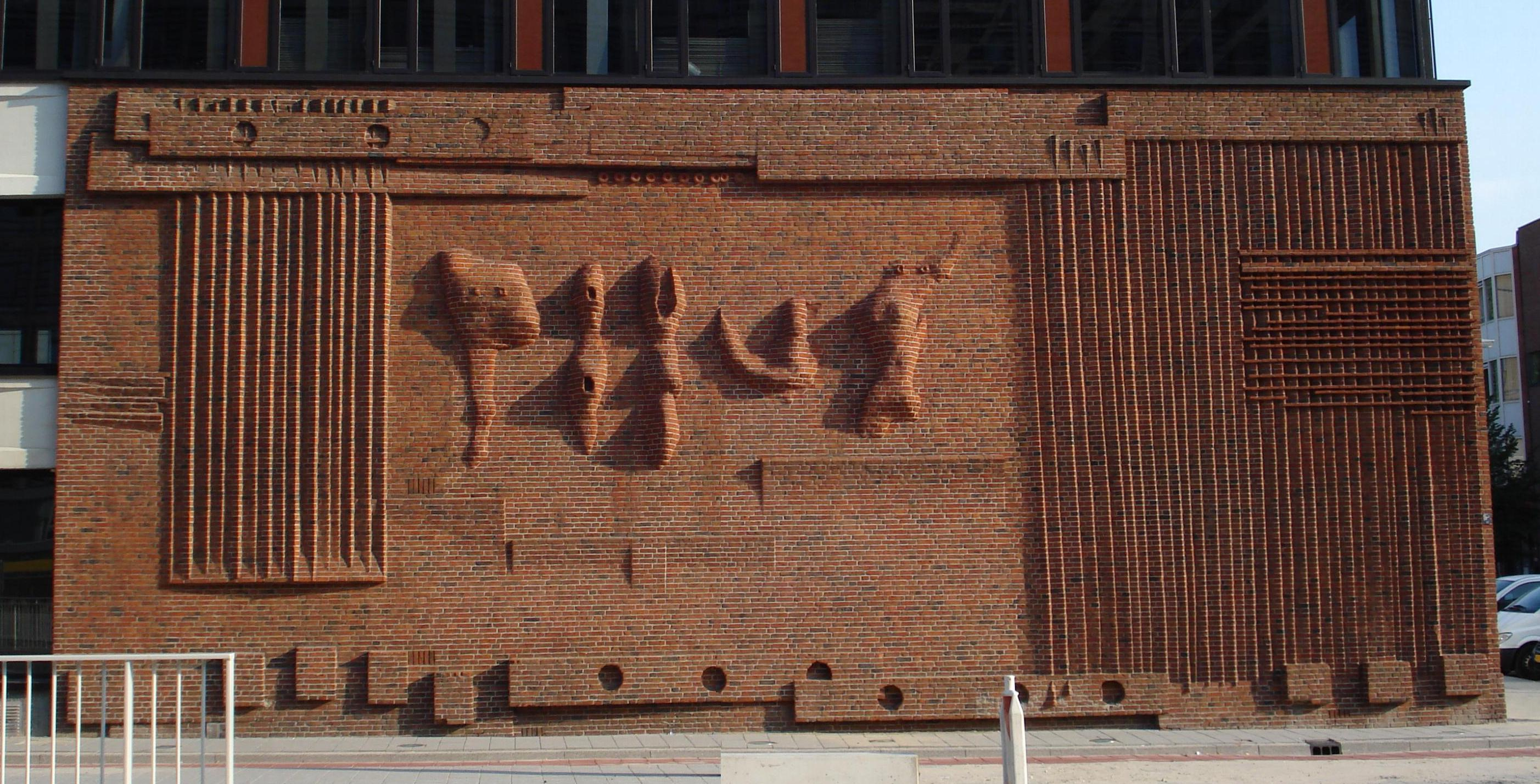 Rotterdam, Weena. kunstwerk.Wall Relief no.1. Rotterdam/The Netherlands.